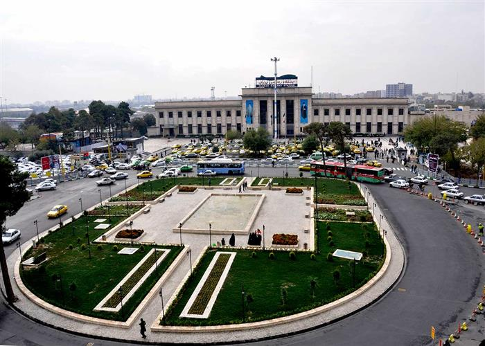 نمایی از ایستگاه ومیدان راه آهن تهران